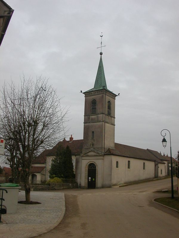 Eglise d' Etaules 21 FRANCE